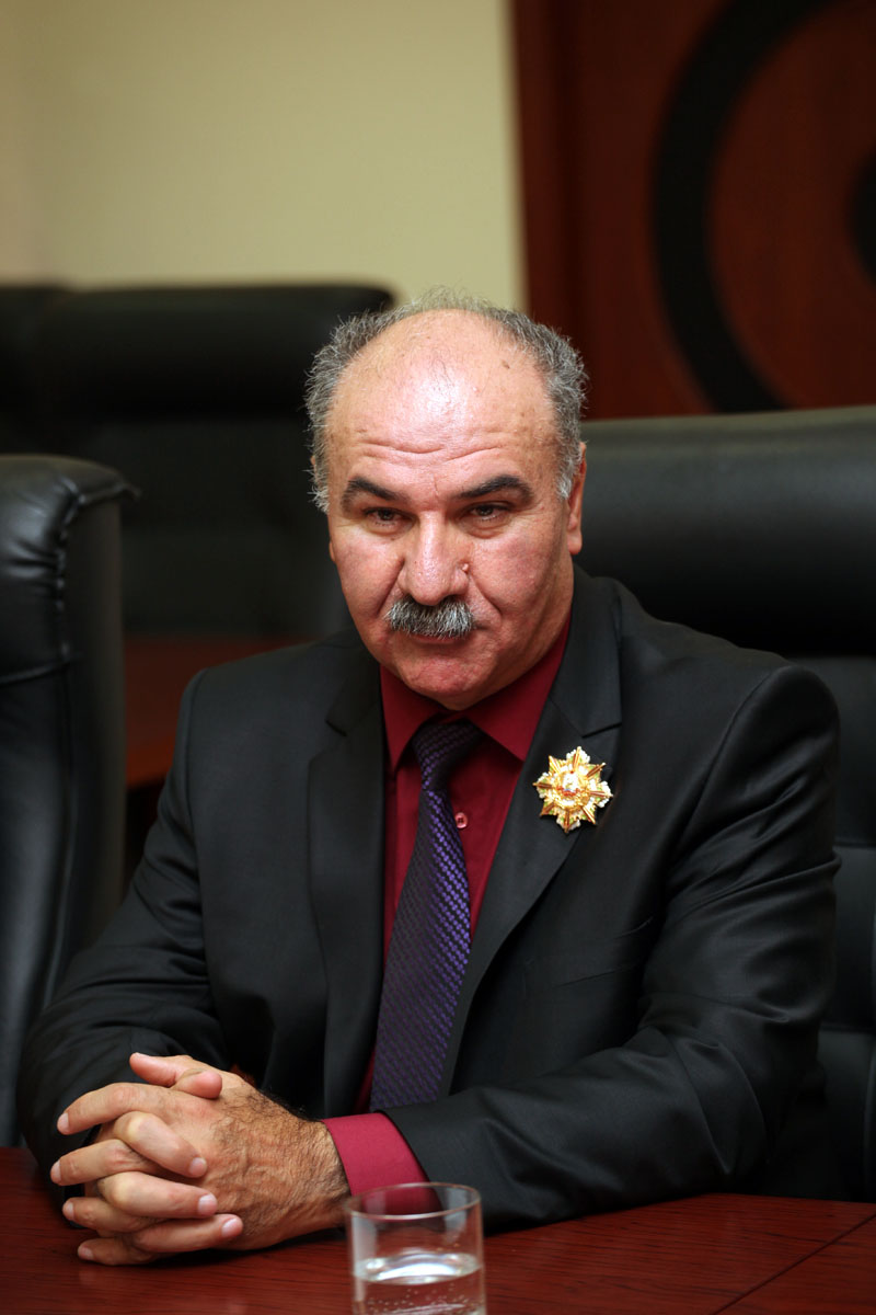 Станислав Яковлевич Кочиев - 4-й Председатель Парламента Республики Южная Осетия